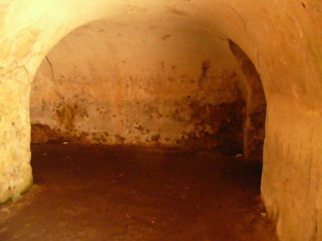 Parque arqueológico de Egnazia, Apulia.